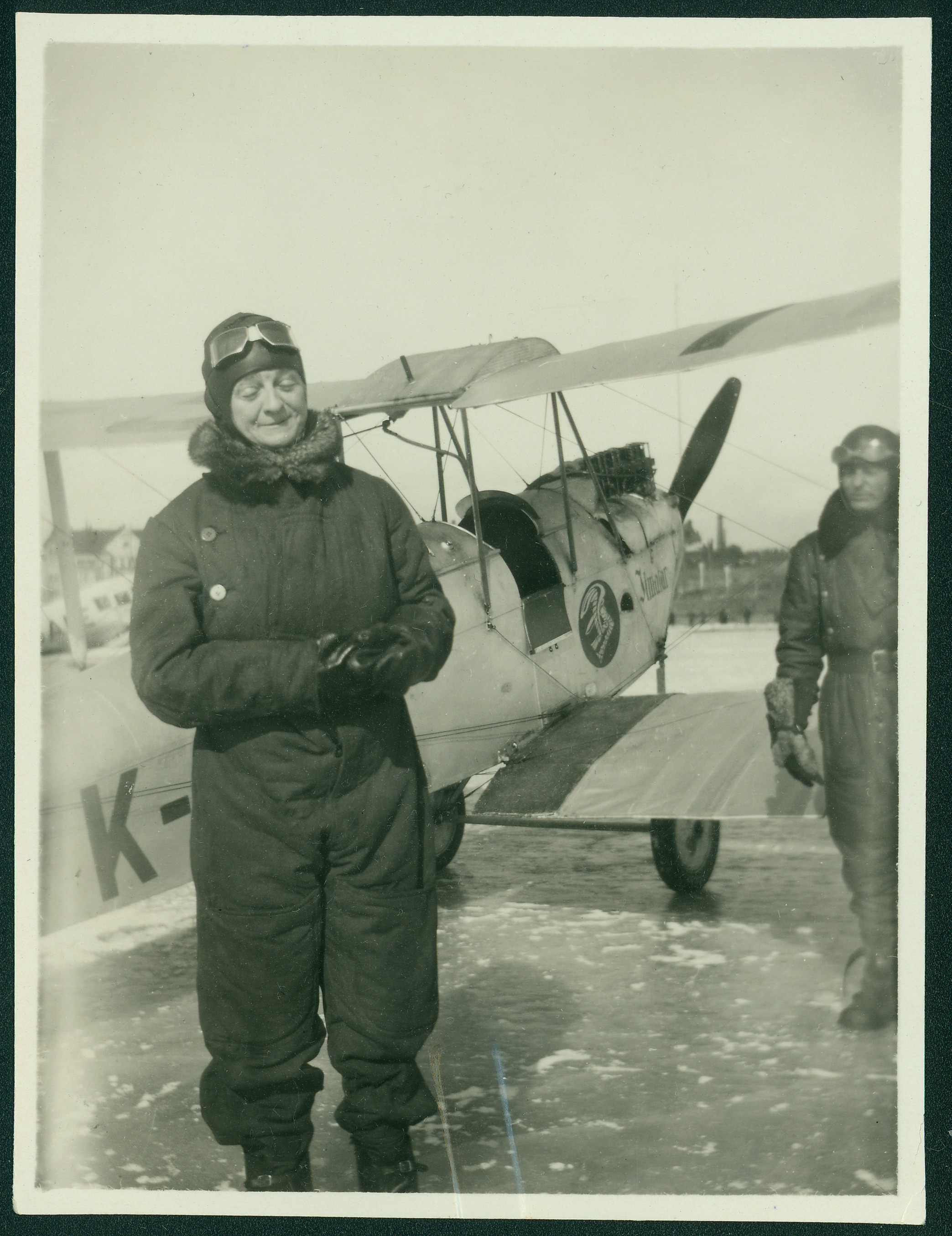 Yseult de Coppet Katajanokan lentosatamassa 1928. Taustalla kaksipaikkainen Ilmatar ja koneen lentäjä Urho Heiskala.